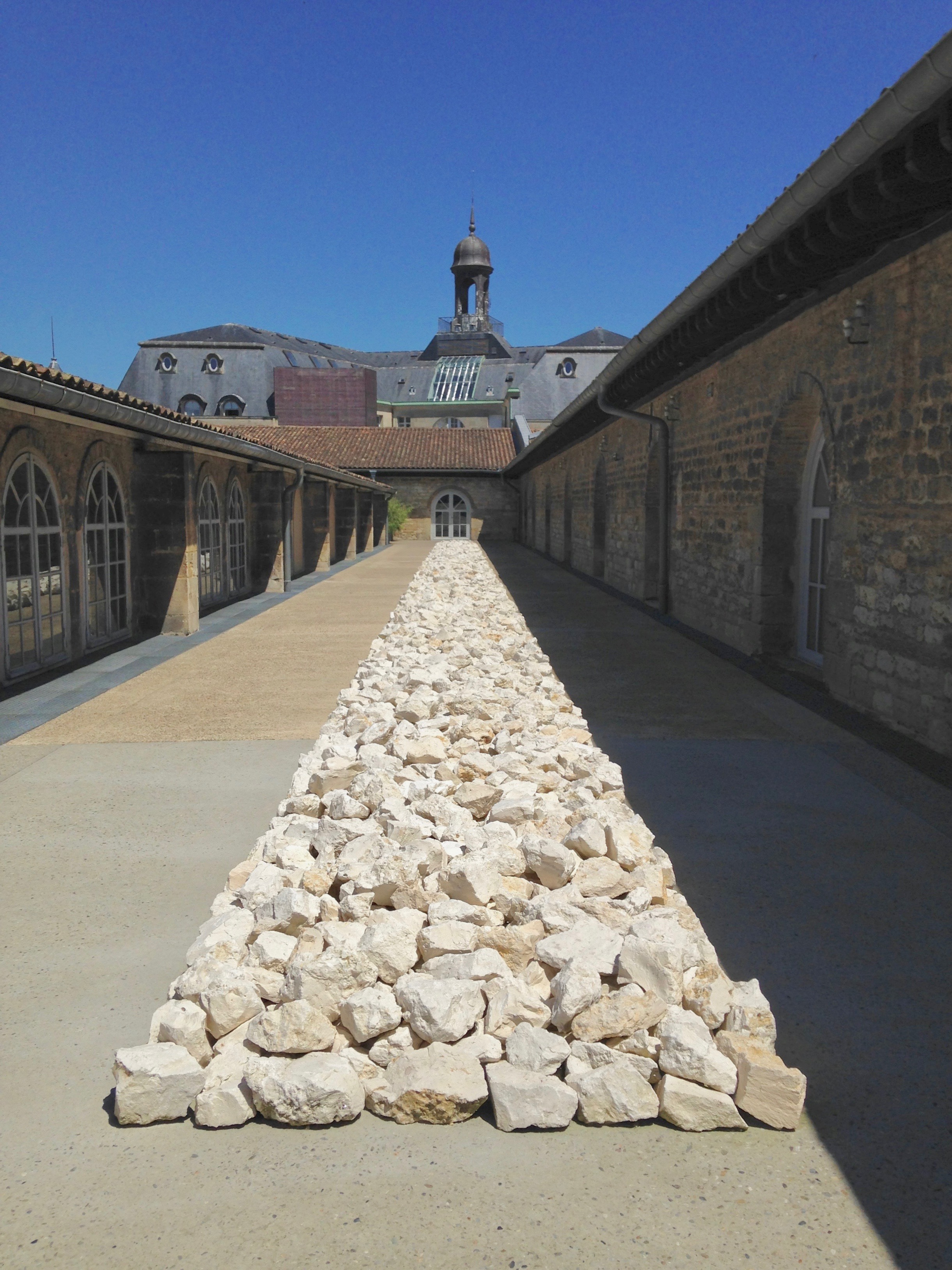 Entrepôt Lainé .